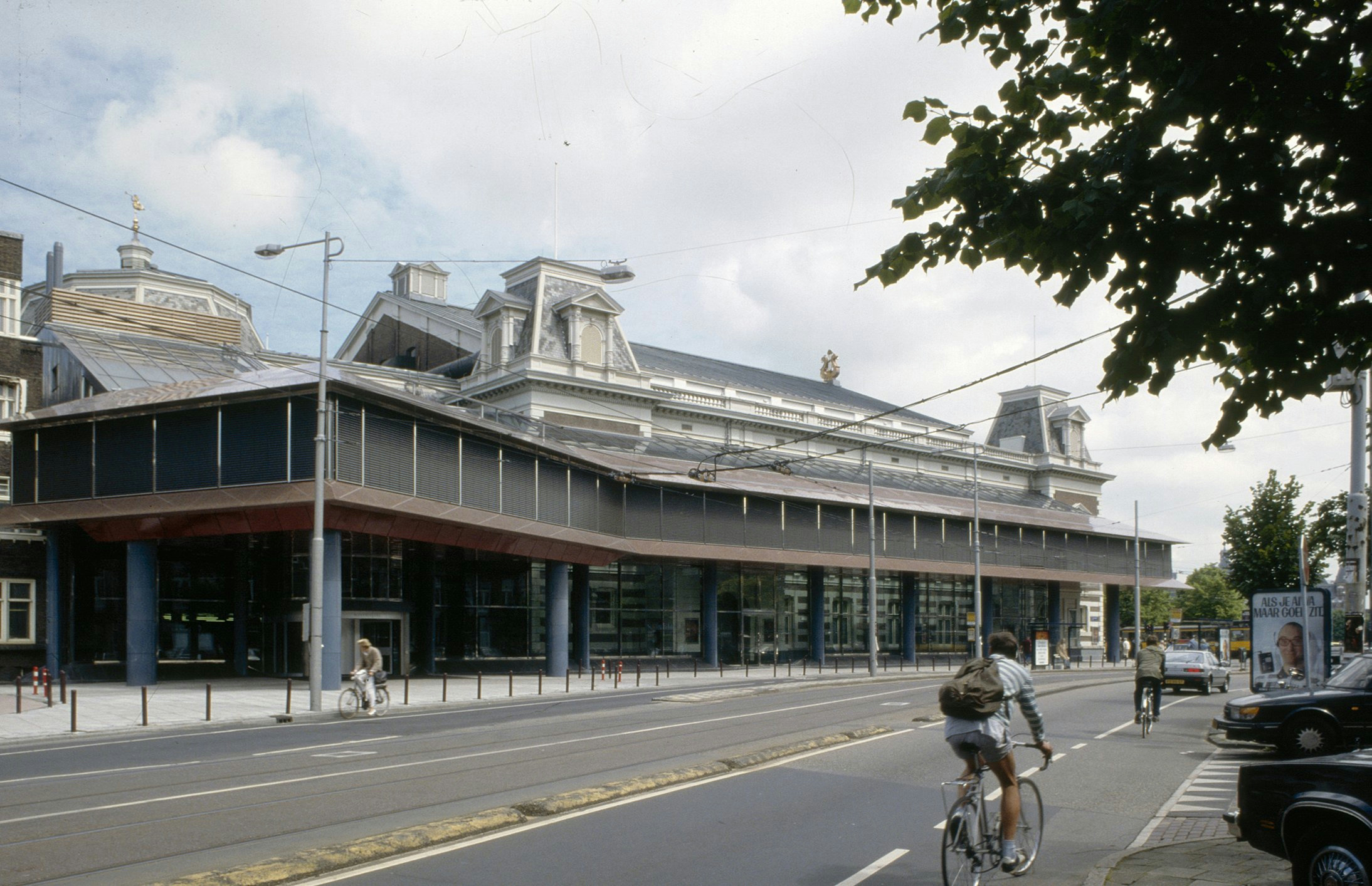 Concertgebouw: Exterieur NIEUWE AANBOUW, OVERZICHT